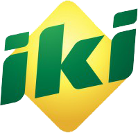 Iki logotipas